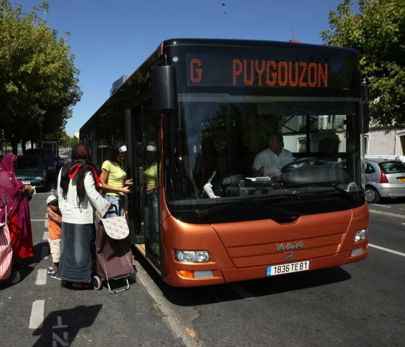 Albi (Tarn, France) : Bld Andrieu, bus Ligne G à destination de Puygouzon.